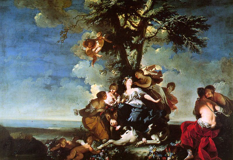 Gemälde: Der Raub der Europa von Giovanni Domenico Ferretti (1692-1768), Galleria degli Uffizi, Florenz